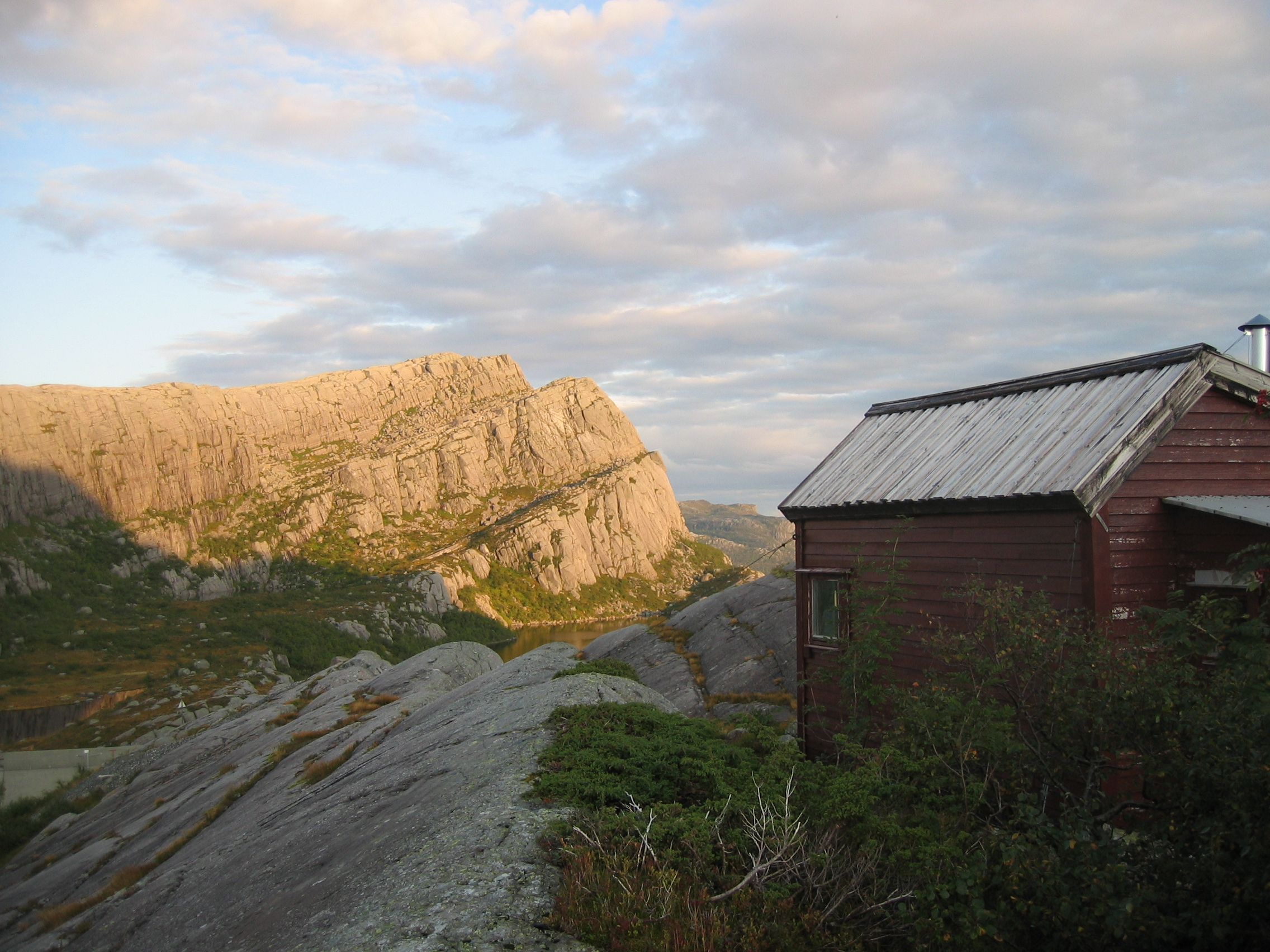 Børabu ved Børavatnet i Flora Kommune. Utsikt mot Grisebotsvatnet og Ulldalsnipa i aust.